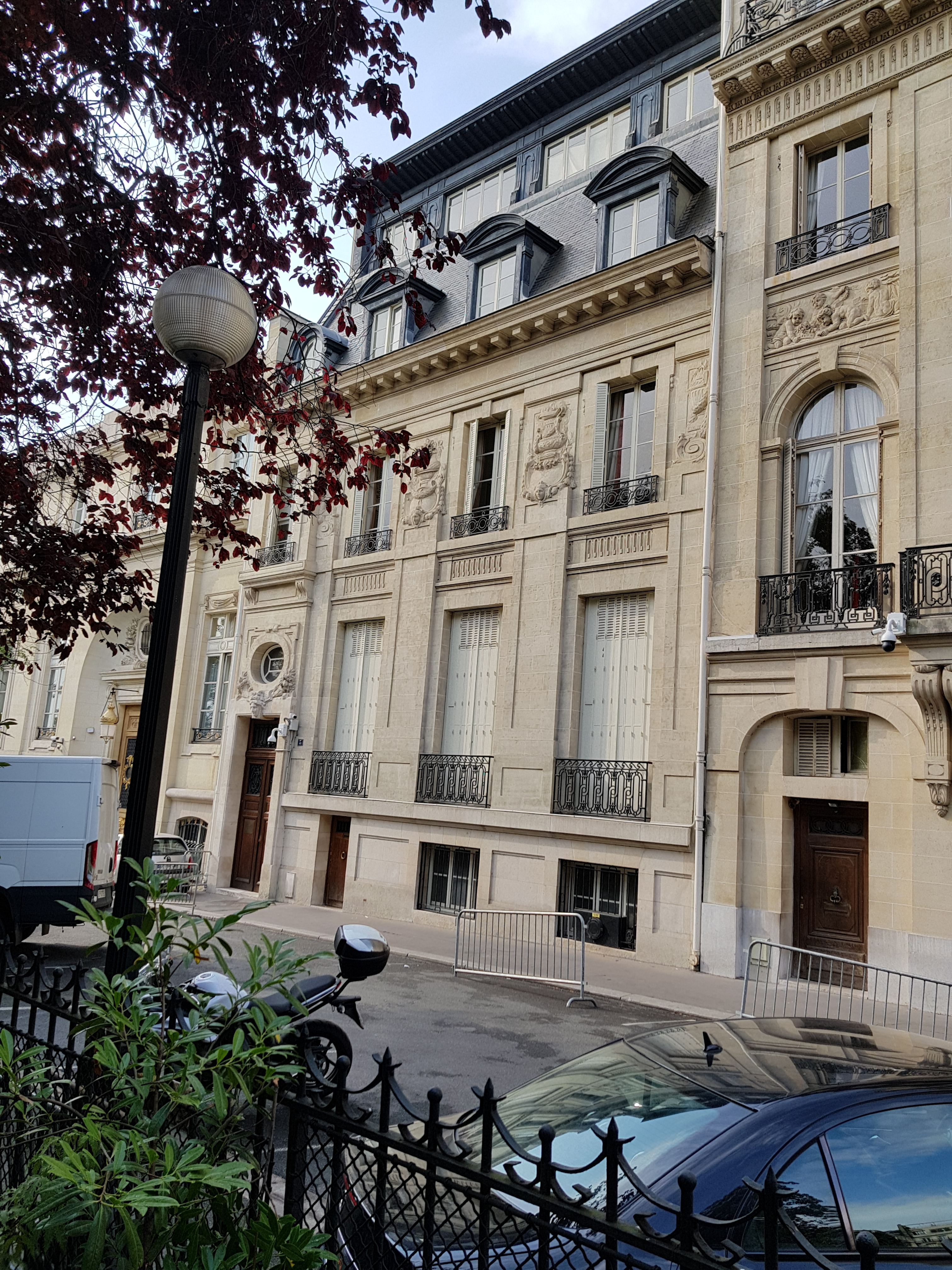 Hôtel Clos, 3, rue Le Tasse, Paris 16e.